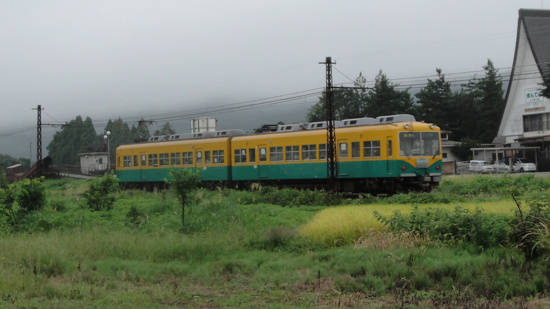 富山地方鉄道立山線の車両を岩峅寺駅-横江駅間で撮影